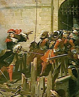 Les gris mousquetaires à l'assaut de Valanсiennes. 17 mars 1677 (Fragment)